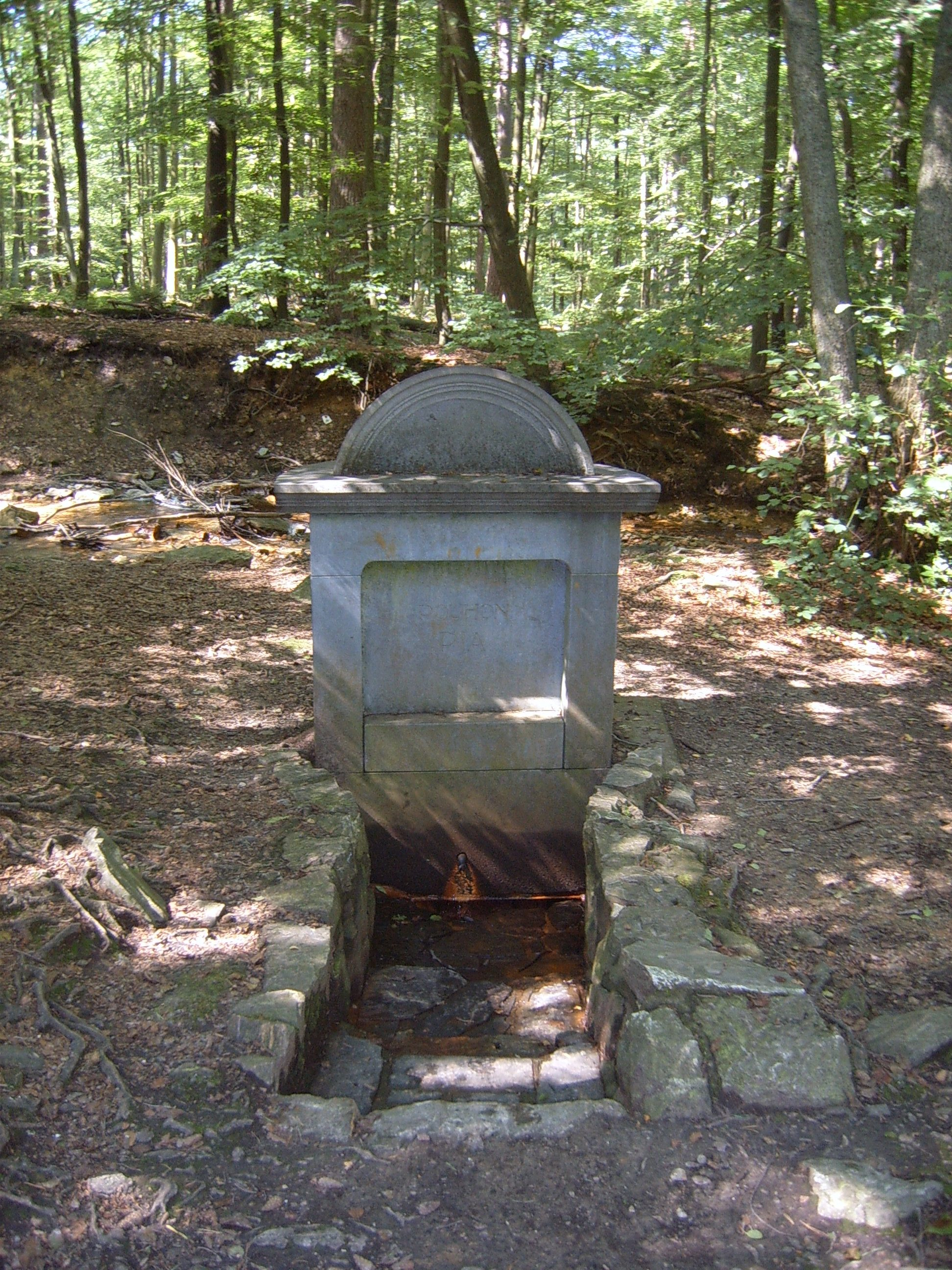 Le Pouhon Pia, Spa. Personal picture, I set it in public domain